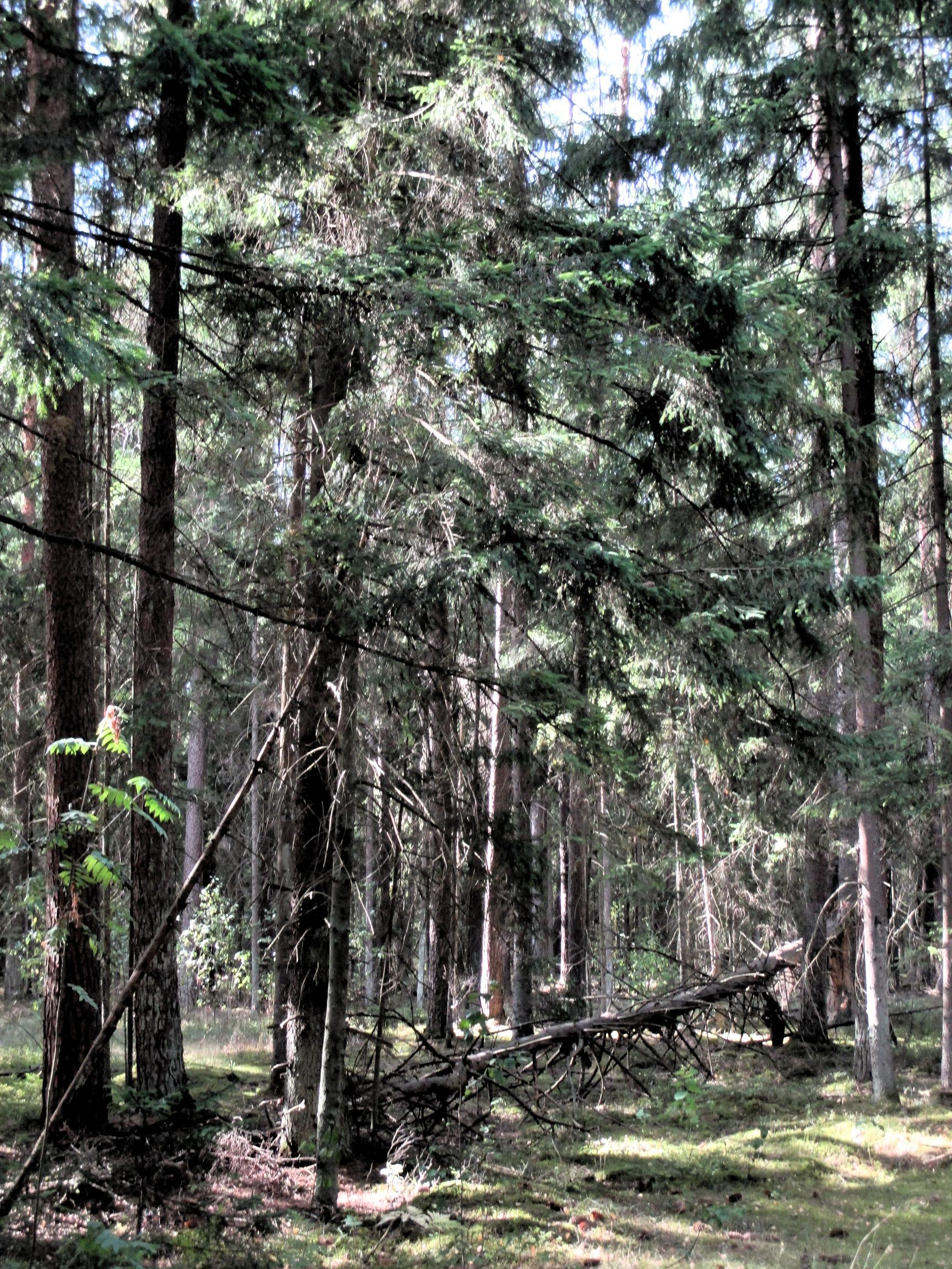 Ліпічанская пушча. Яловы лес (Дзятлаўскі раён)